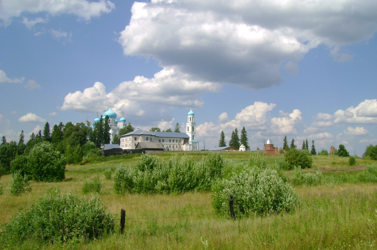 Нижний парк Авраамиевского монастыря, Чухломский район This image is related to the protected area of Russia number 4410851